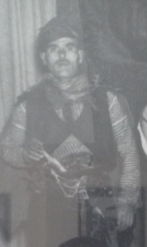 Tatlar Seğmen Ağası Sıtkı Tunca